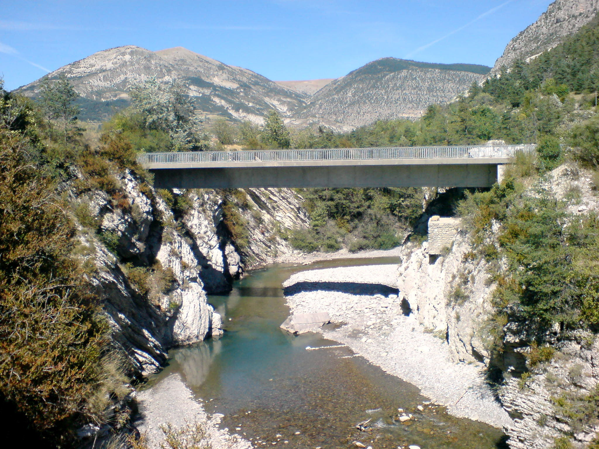 Sur la RD908a